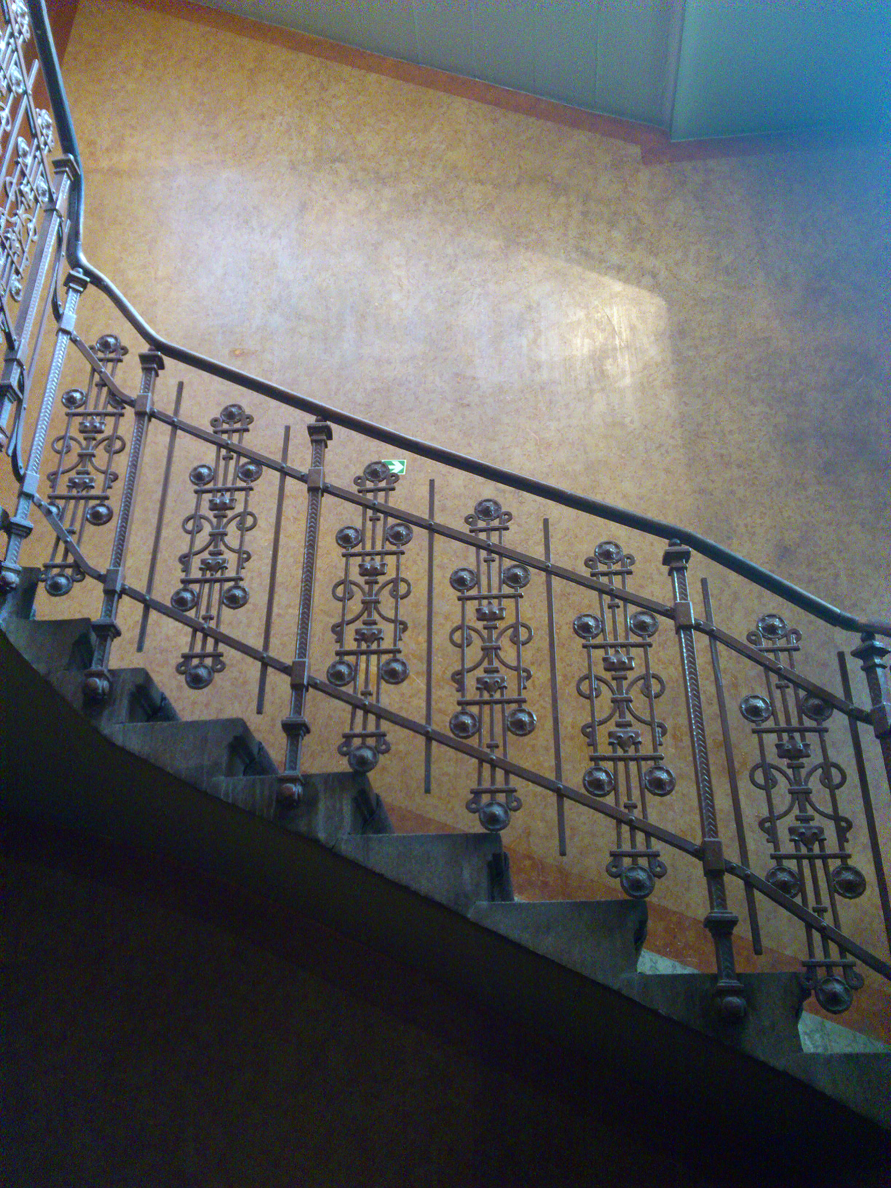 Beograd Prometna banka ugao Knez Mihailove 26 i Zmaj Jovine 12